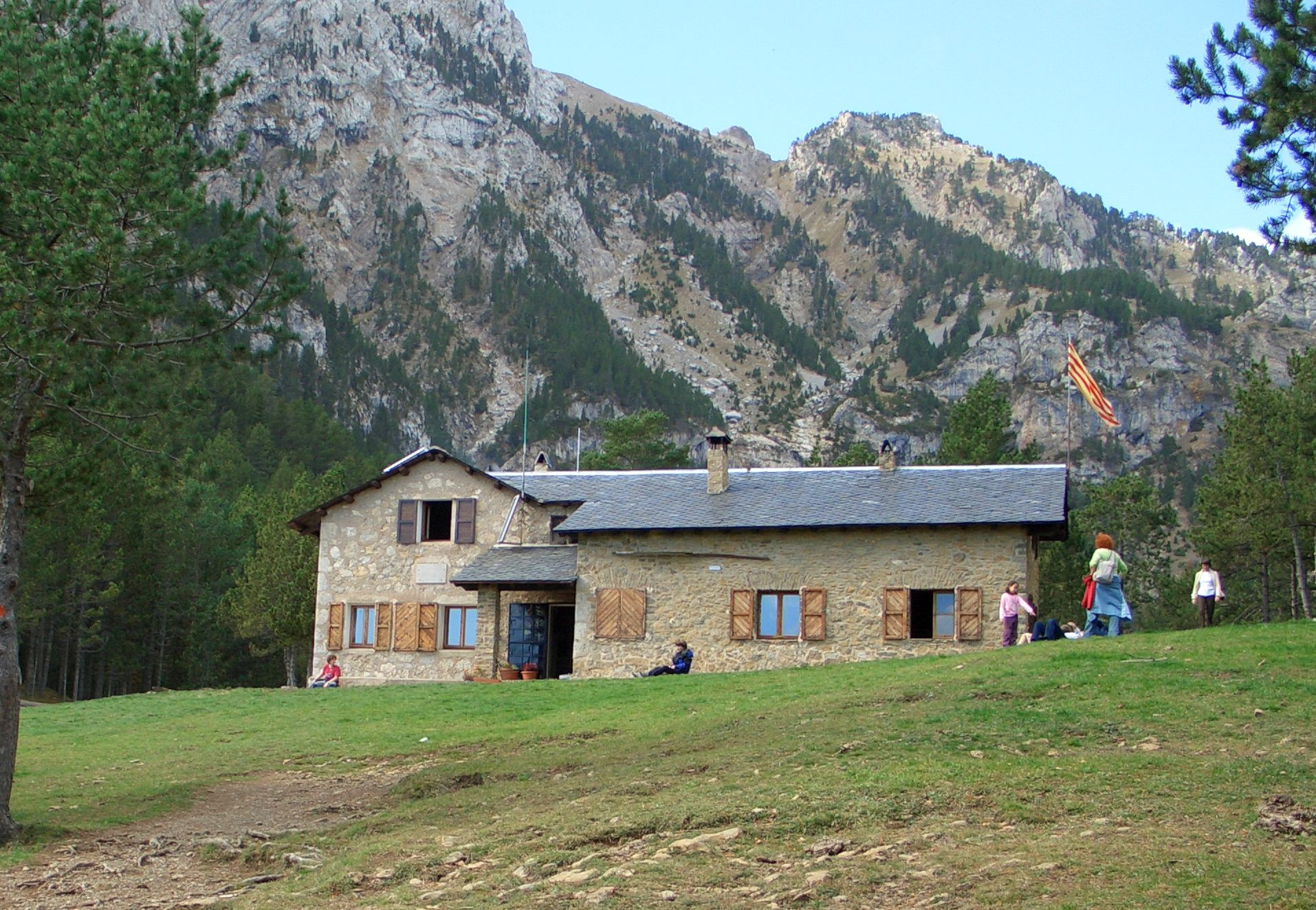 Peraforca - Refugi Lluís Estasen